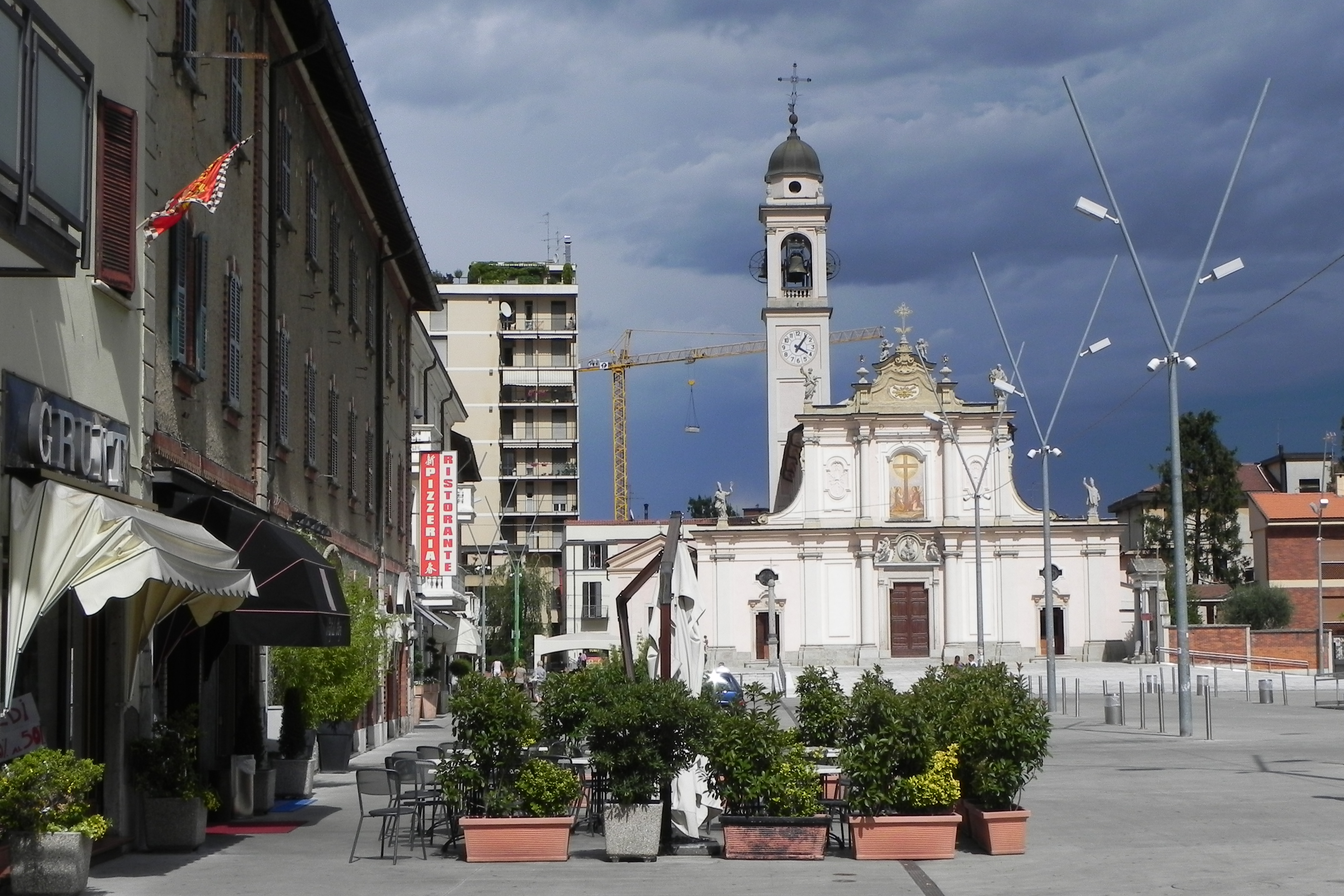 Cinisello Balsamo, piazza Gramsci